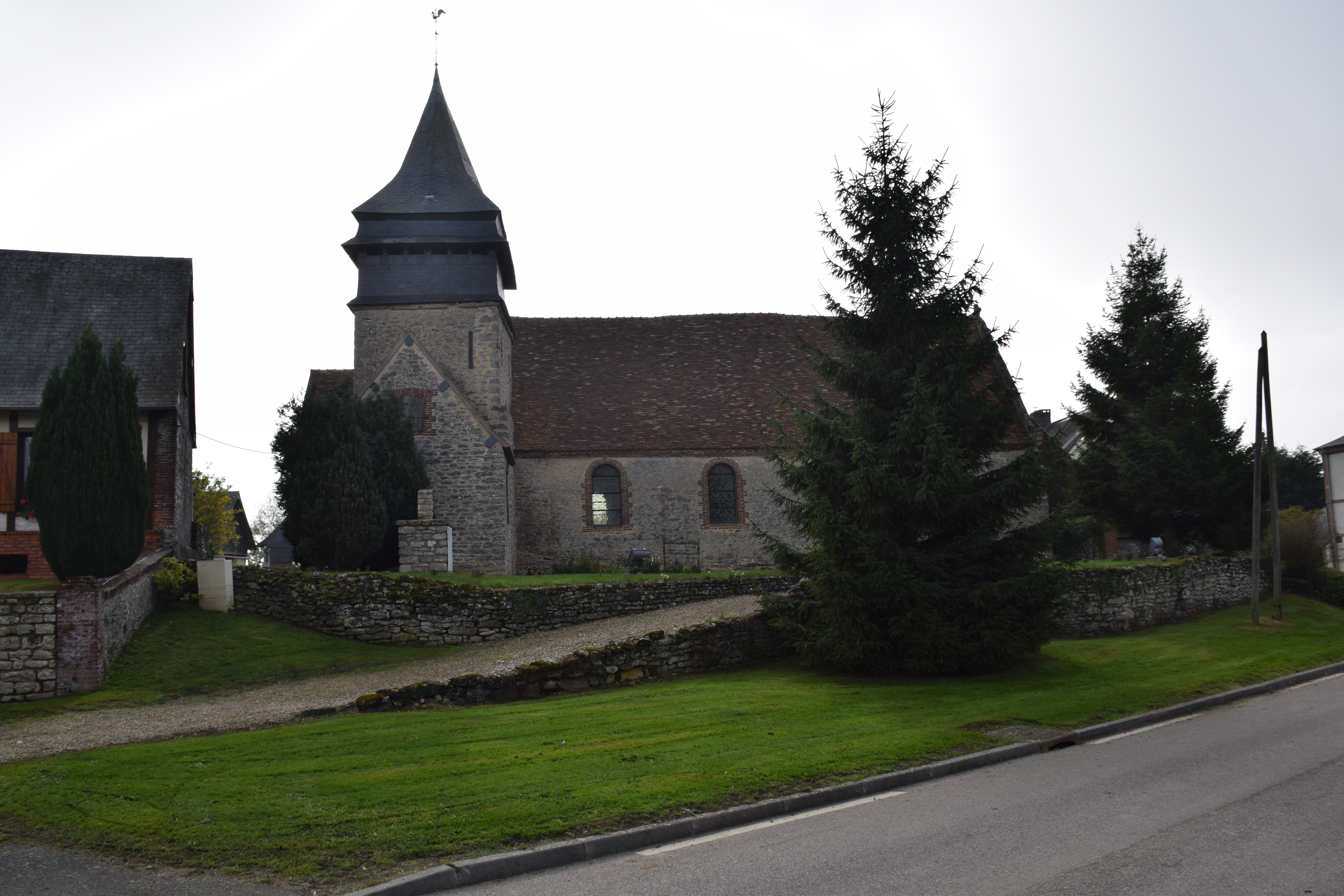 Eglise